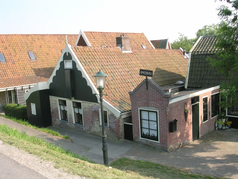 De oude smederij in Kolhorn. A former smithy in village of Kolhorn.